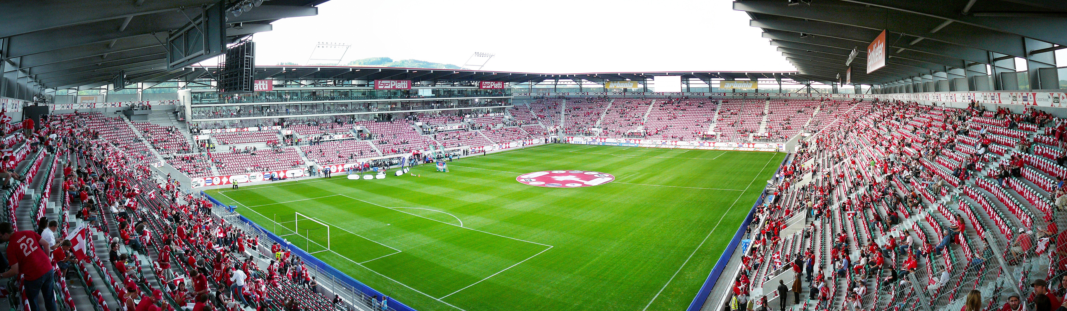 AFG Arena St. Gallen - Erstes Spiel SCHWEIZ : LIECHTENSTEIN - Vorbereitung EURO 2008